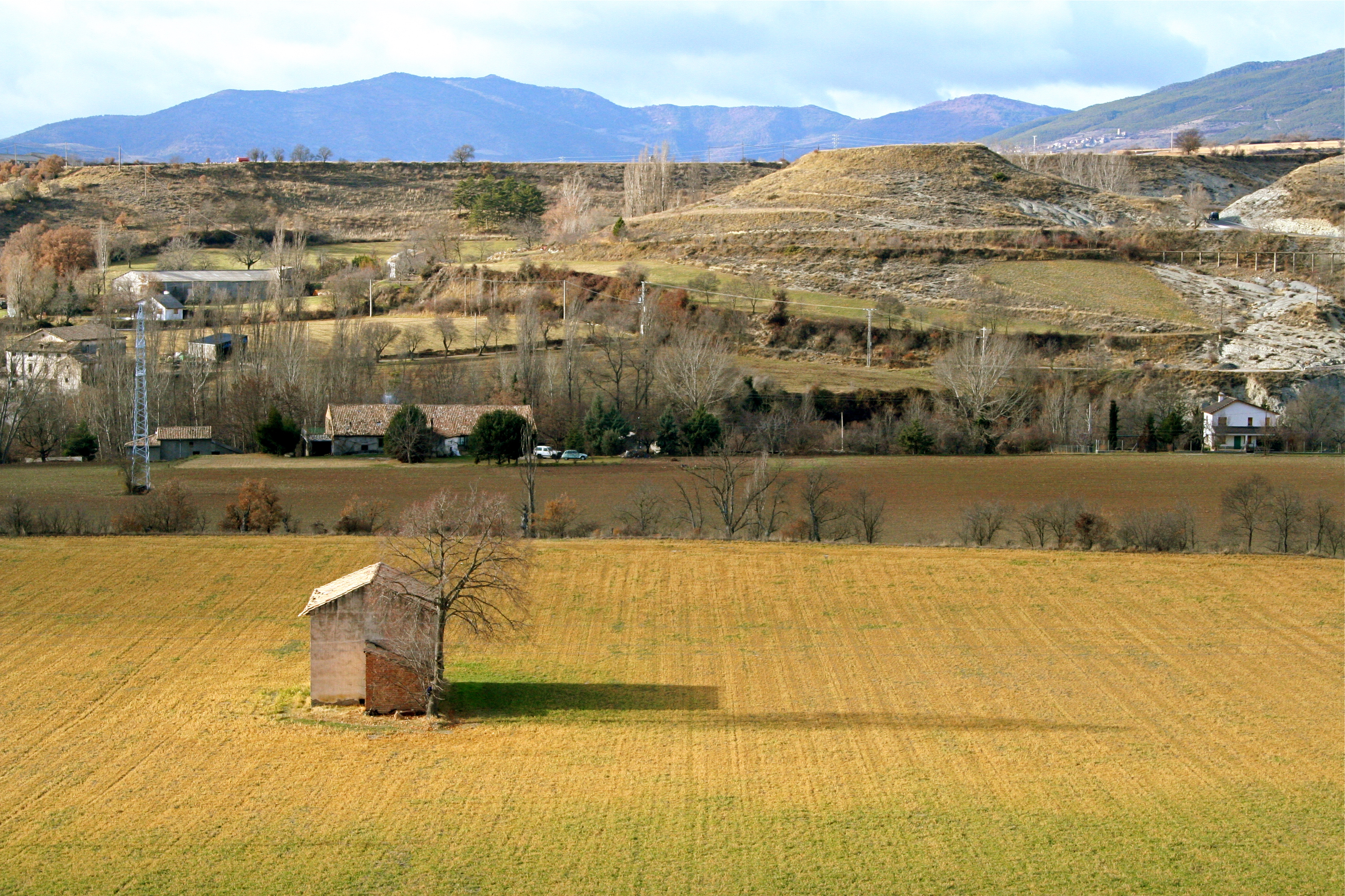 Desde el "rompeolas" del Parque de Jaca mirando hacia el Puente de San Miguel.